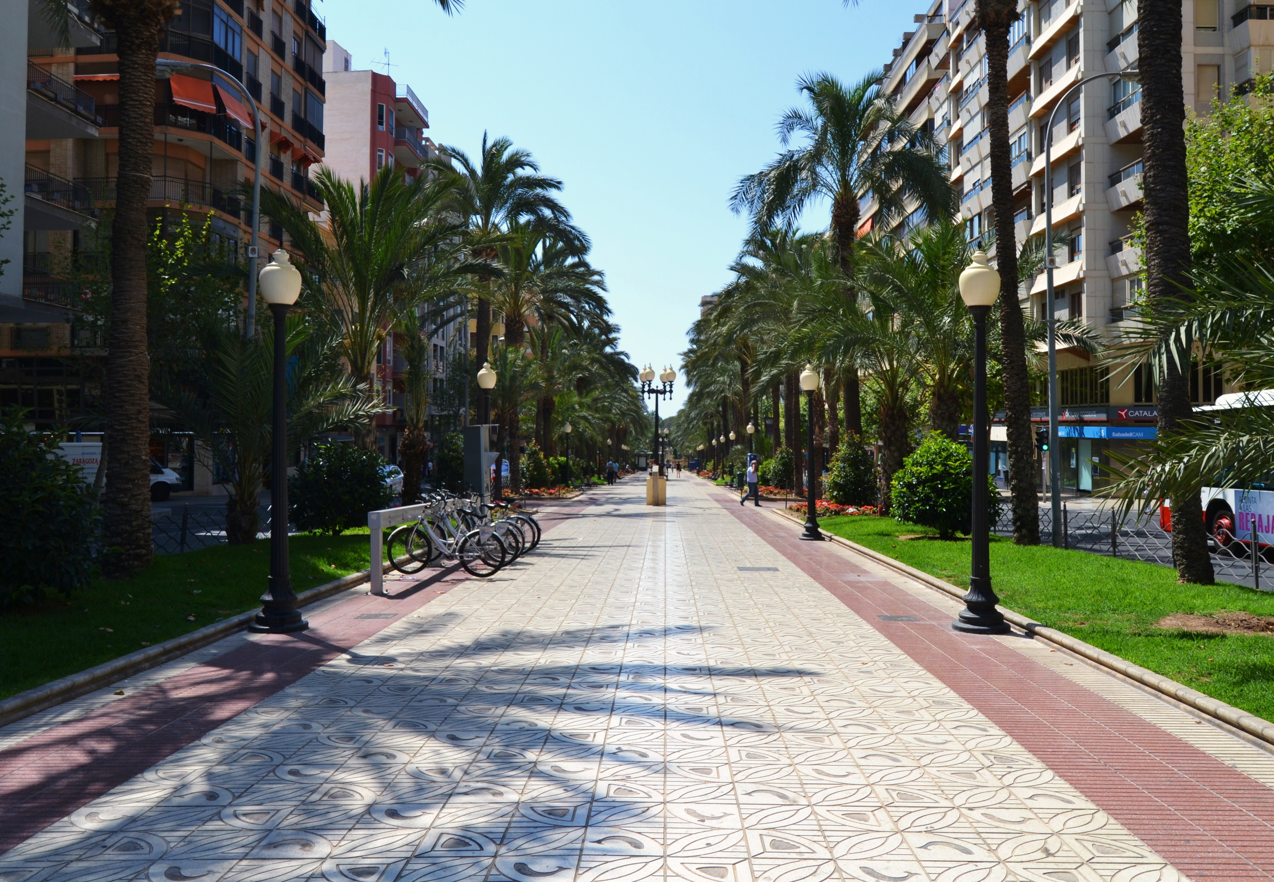 Alacant, avinguda de Federico Soto.